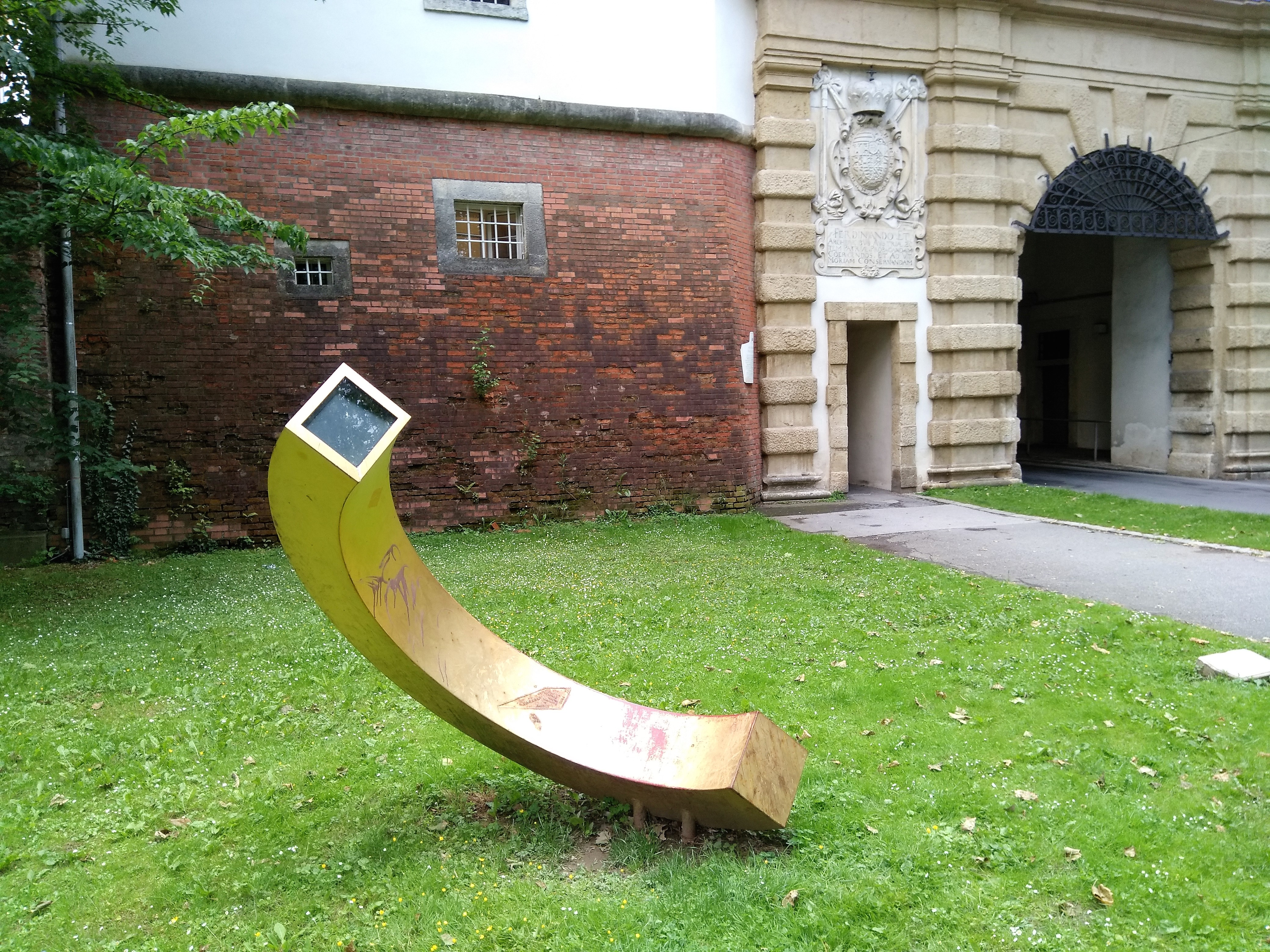 Ehrenring. Denkmal für Oktavia Aigner-Rollett